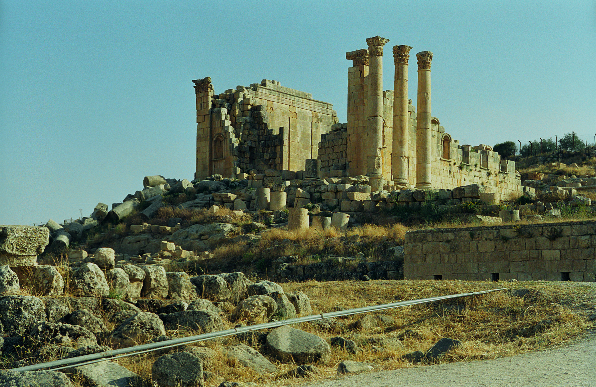 Jerash, Jordan